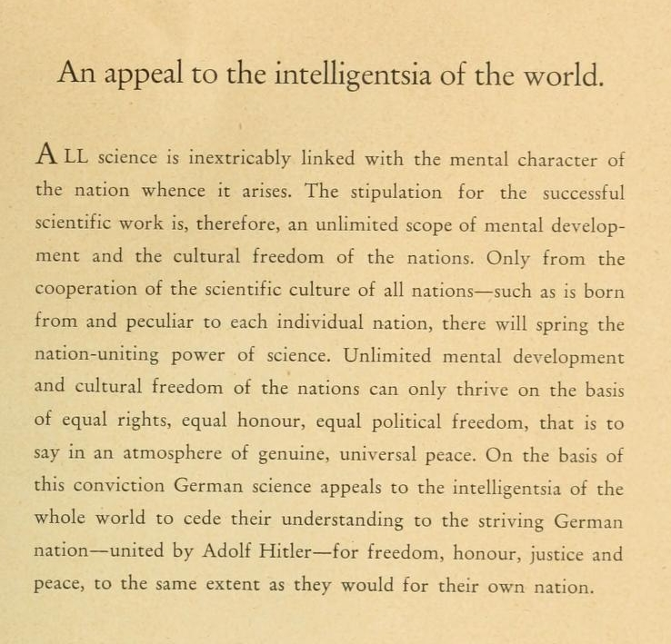 Bekenntnis der Professoren an den Universitäten und Hochschulen zu Adolf Hitler und dem nationalsozialistischen Staat; überreicht vom Nationalsozialistischen Lehrerbund Deutschland-Sachsen